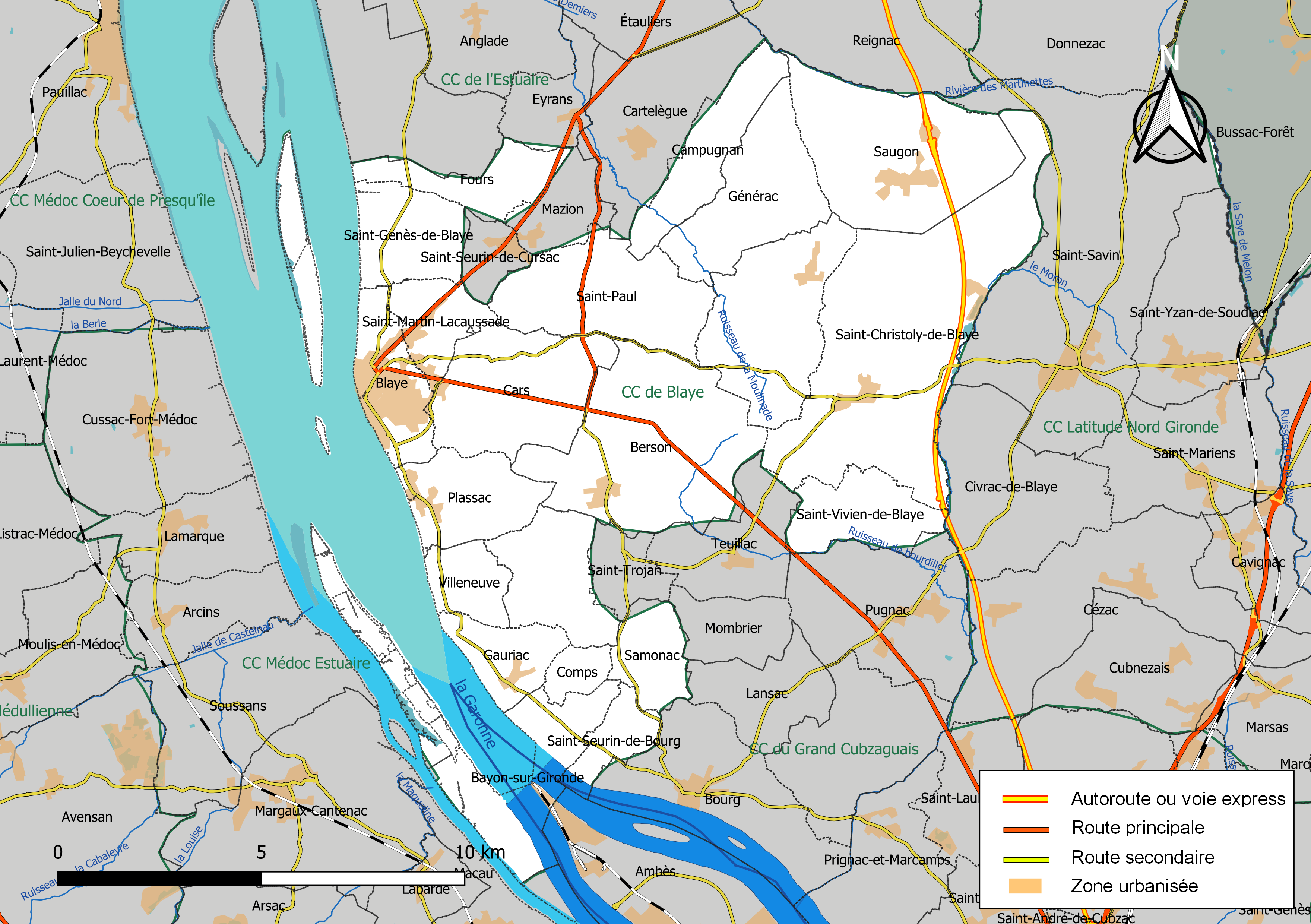 Carte géographique de la Communauté de communes de Blaye, département de la Gironde, France. Composition au 1er janvier 2019.